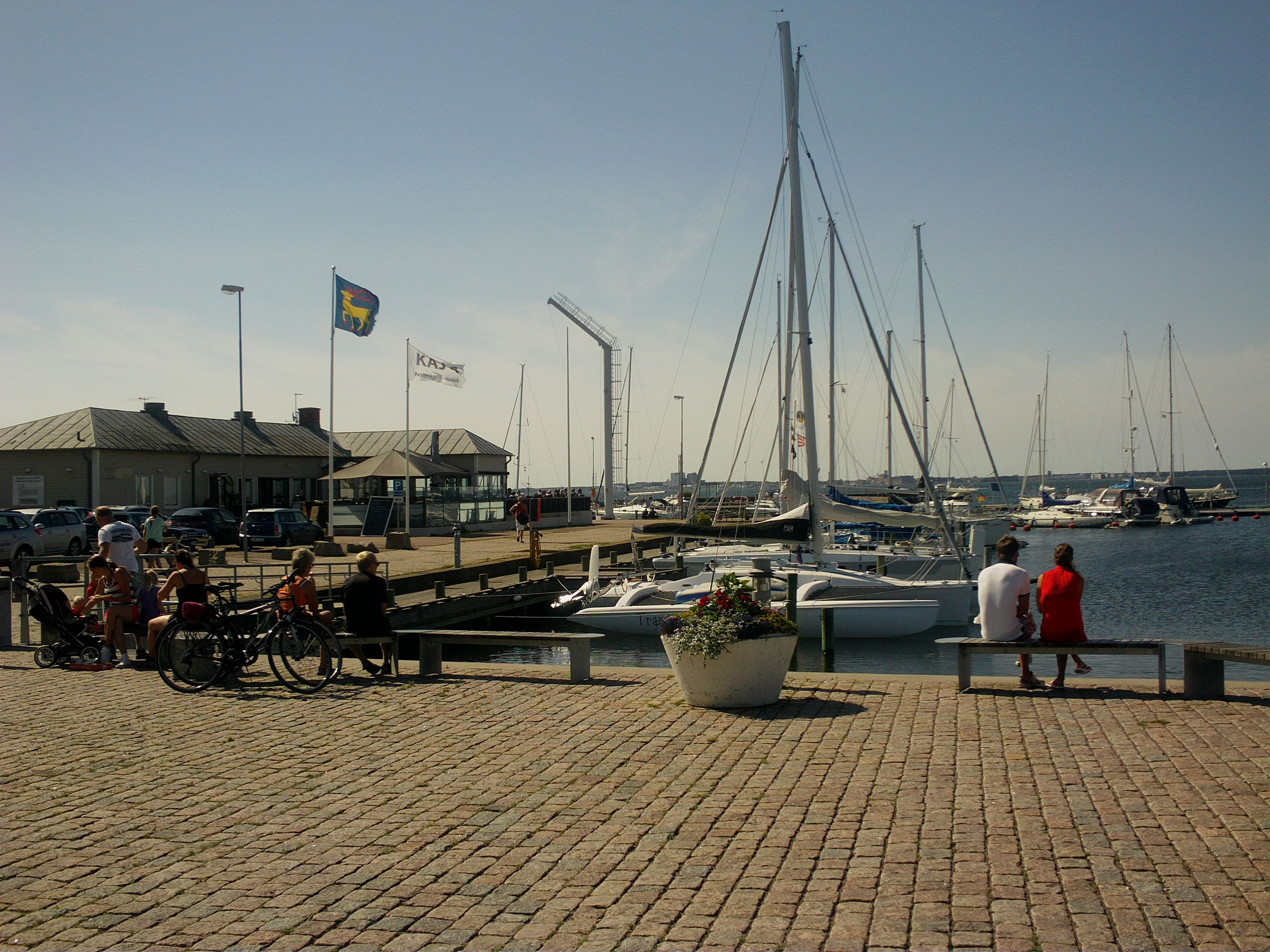 Färjestaden hamn